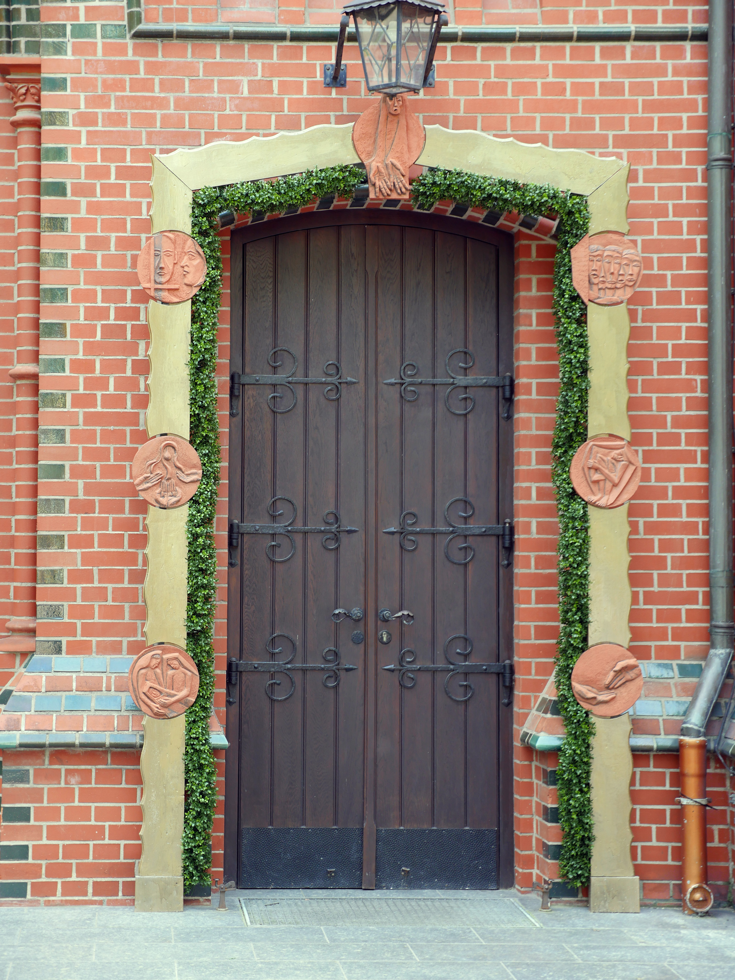 Heilige Pforte in Sankt Paulus Moabit